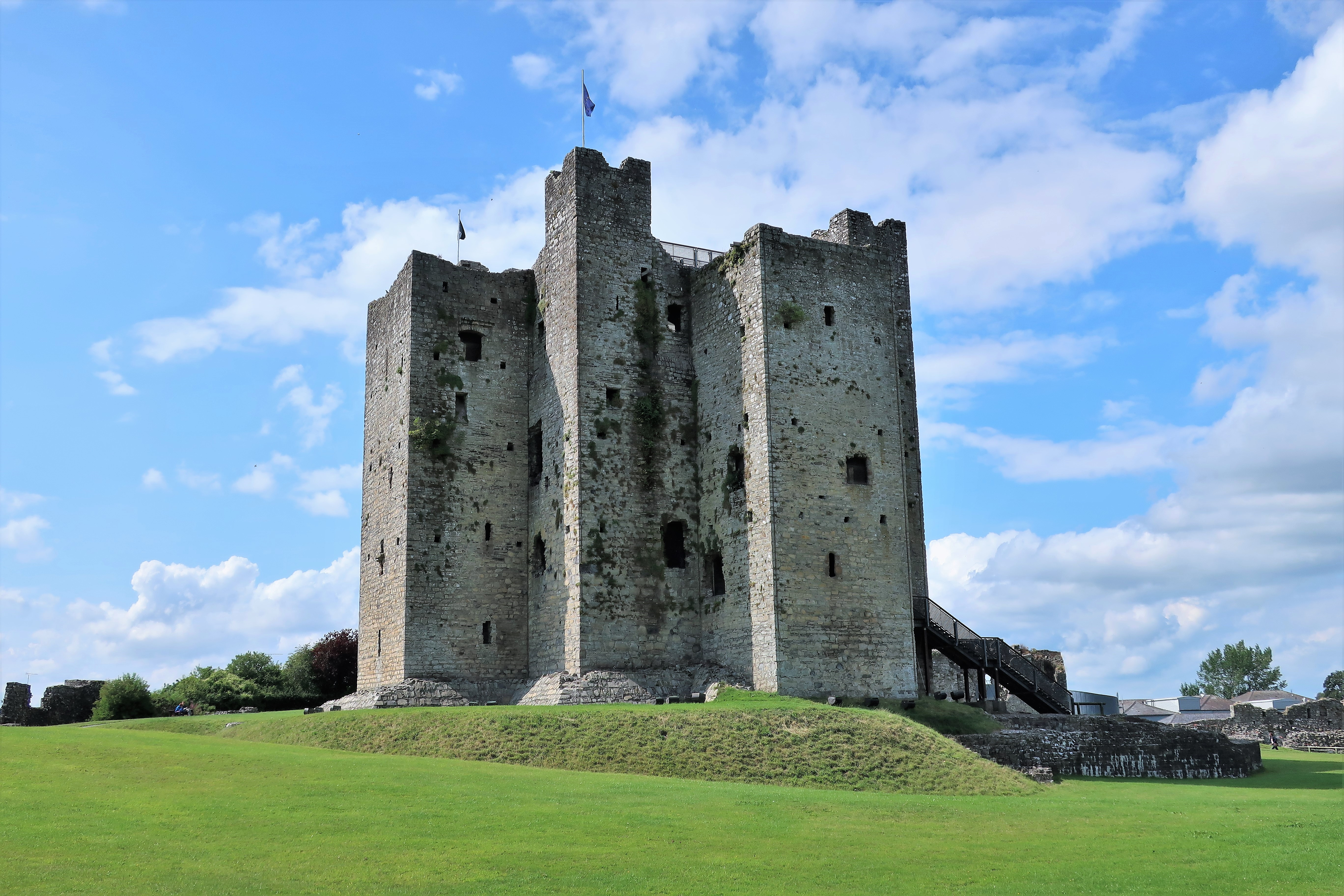 Trim Castle. Auf dem höchsten Punkt in der Mitte des Geländes wurde der quadratische Keep angelegt - überragt von vier Türmchen an den Ecken des Hauptbaus und verstärkt durch vier vorspringende Türme, von denen nur drei erhalten blieben.